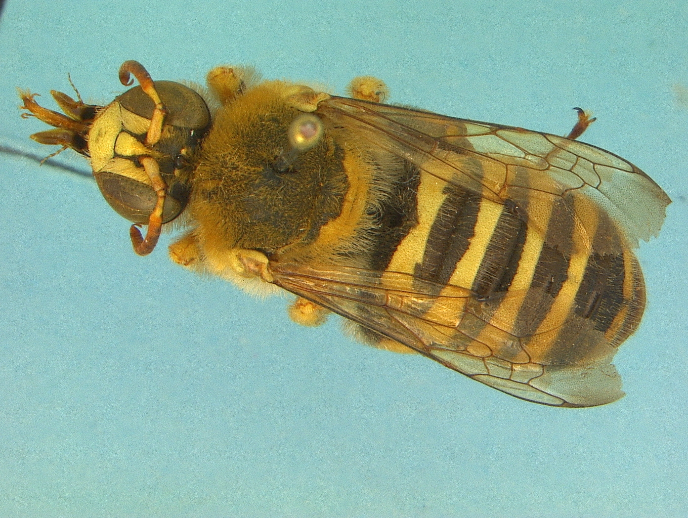 Meganomia gigas (Melittidae)